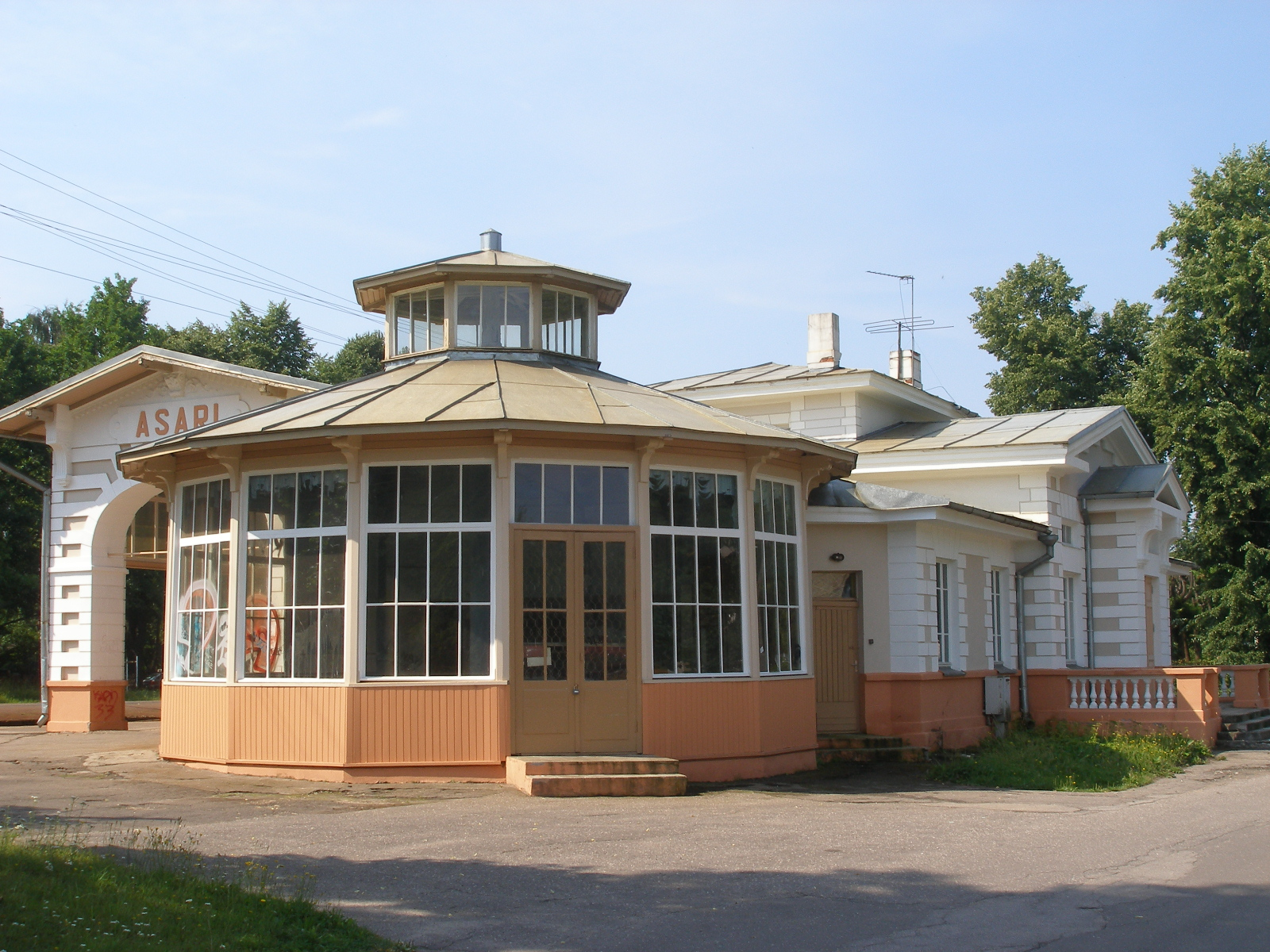 Asaru stacijas ēka. Skats no stiklotās vasaras kafejnīcas puses.